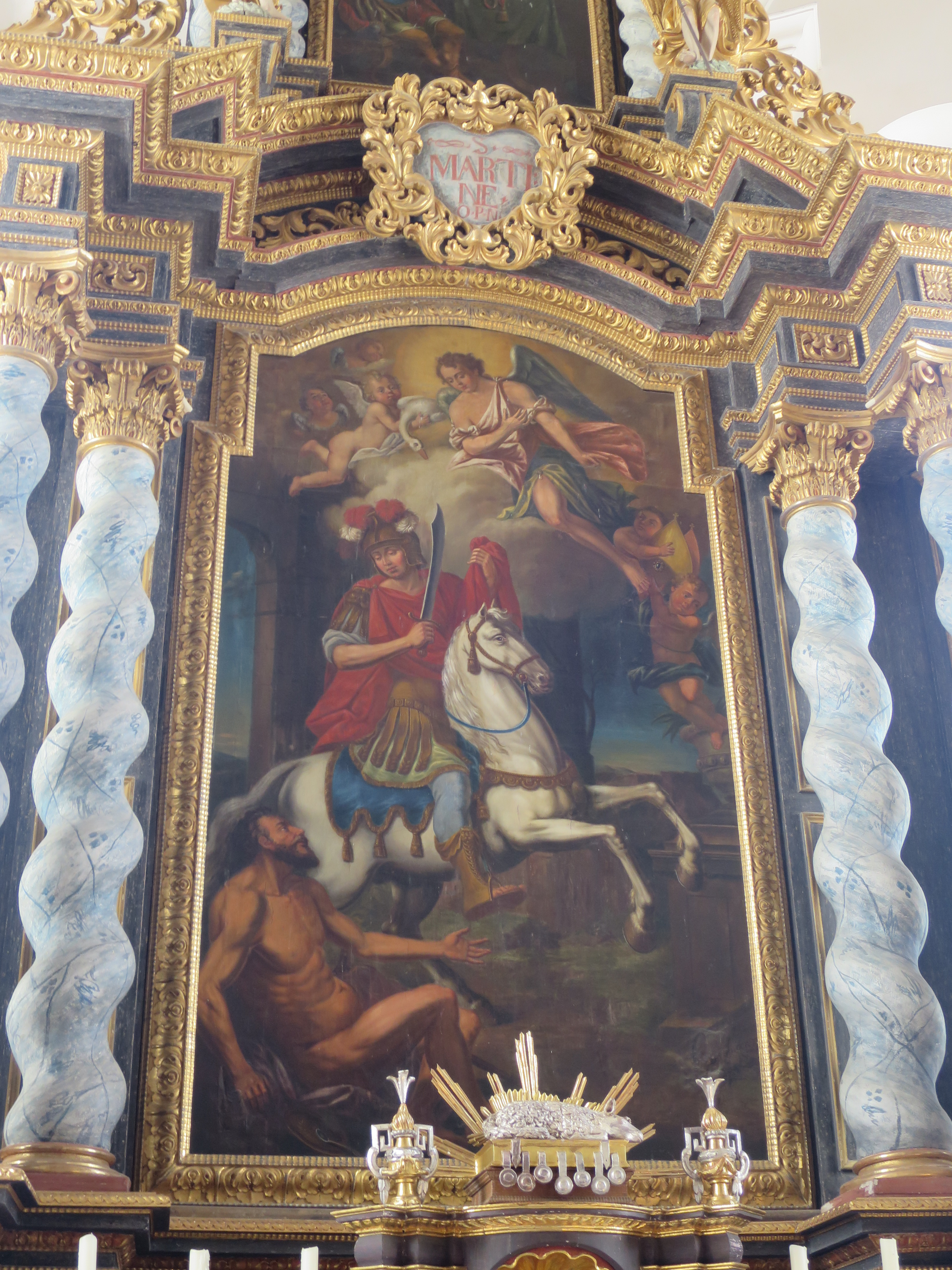 Hochaltar von H.Hett 1724. Bild Hl. Martin von Fr.S. Kirzinger (1774)